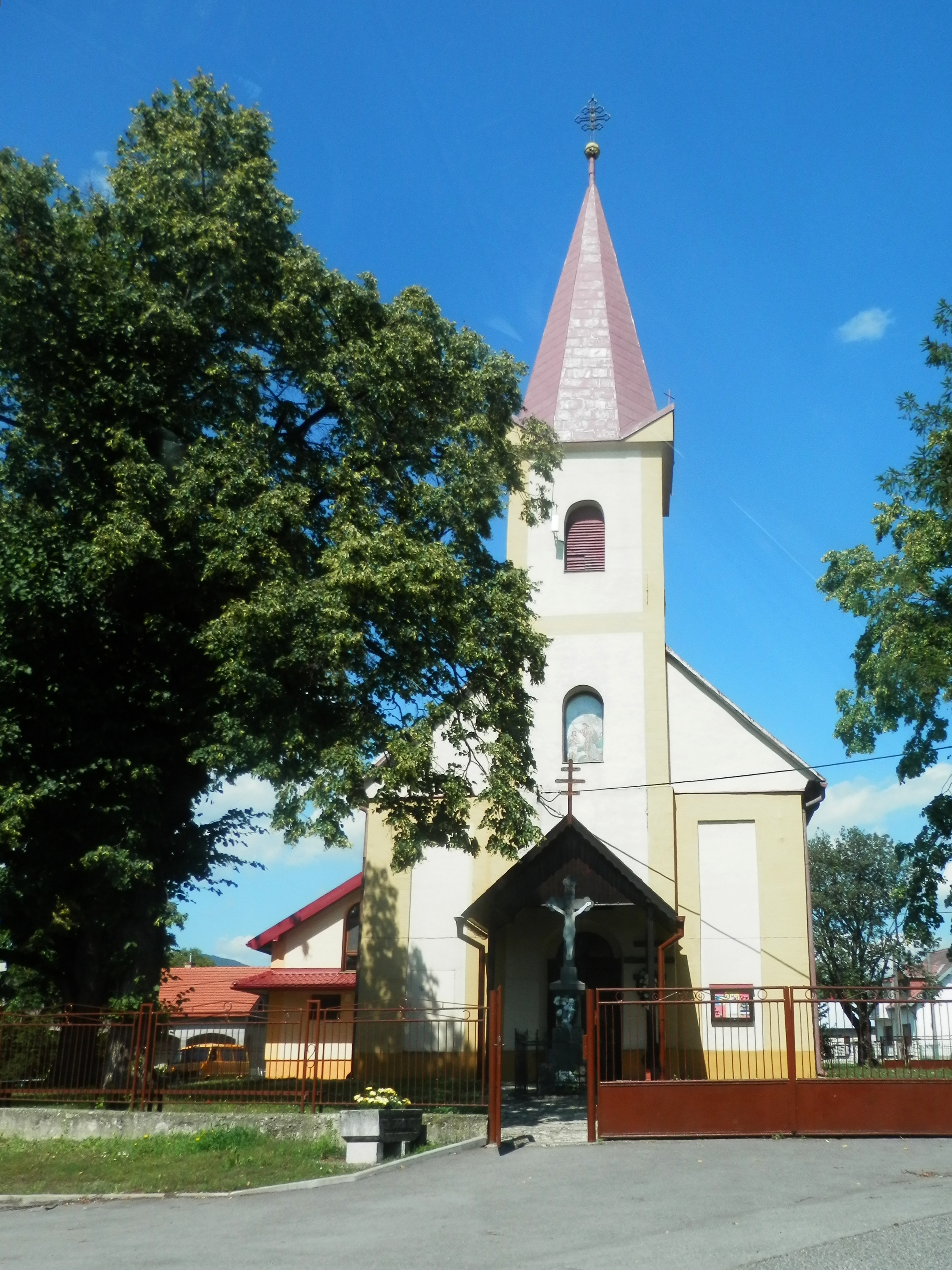 Intravilán obce Poruba pod Vihorlatom, okres Michalovce. Slovensko.